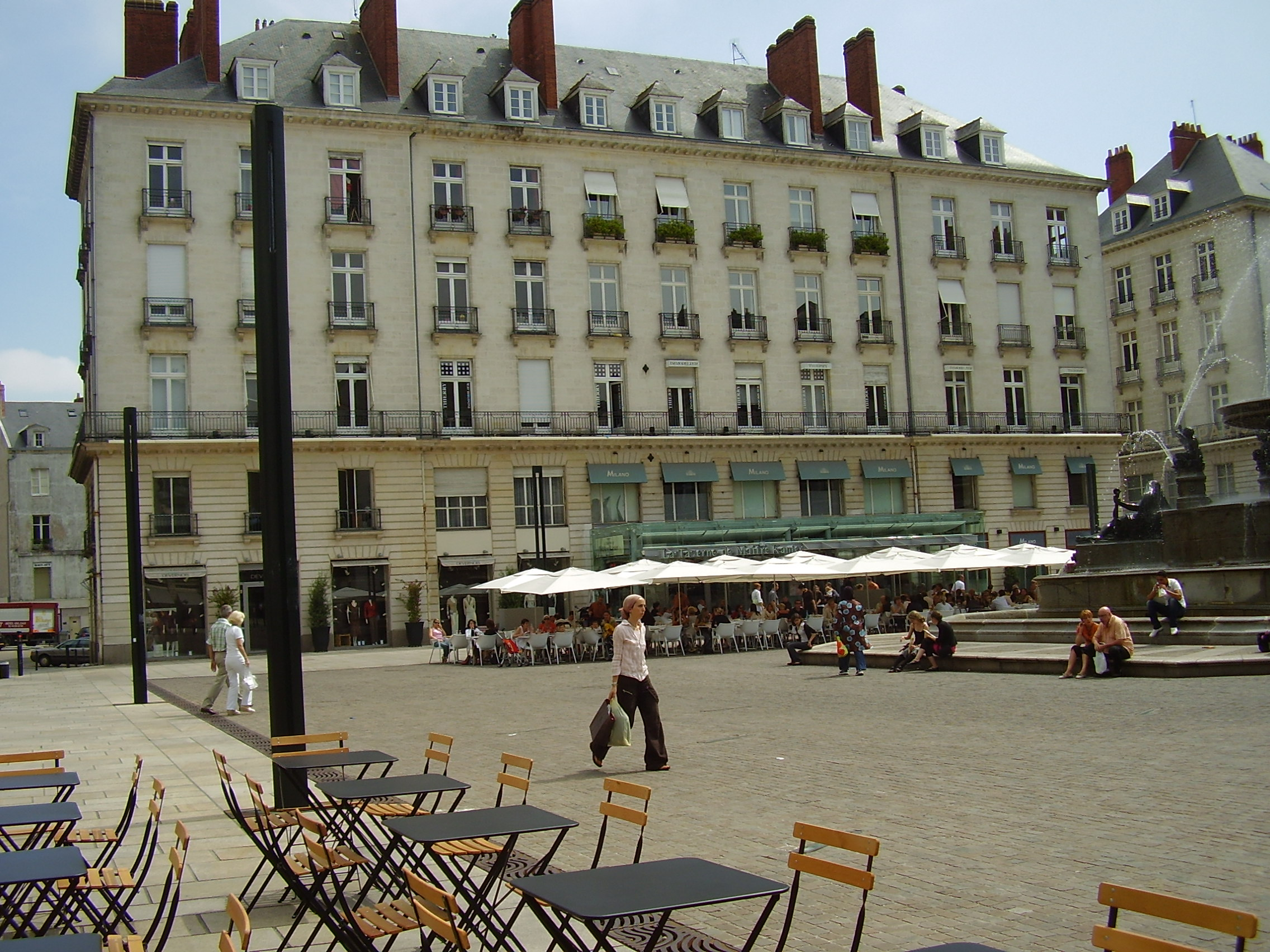 Nantes, France